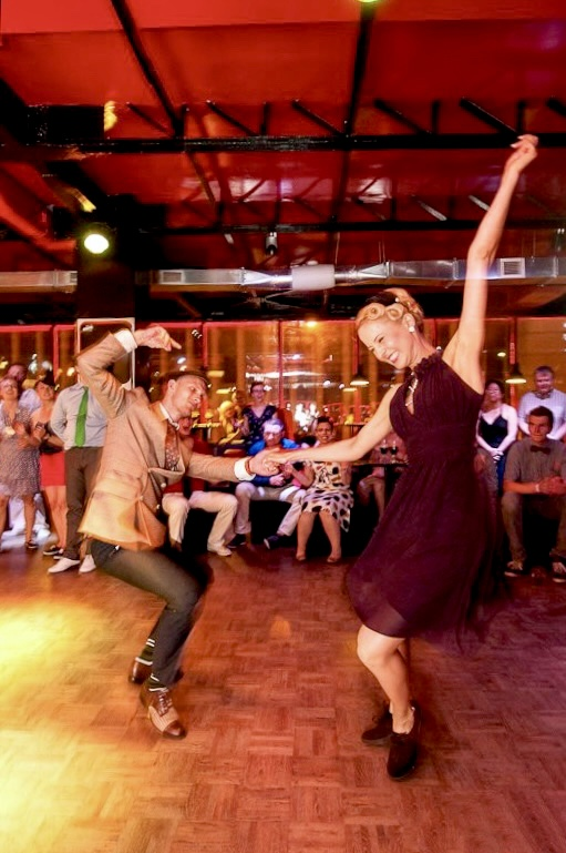 Michał Oblaciński i kasia Dybkowska - animatorzy tańca Lindy Hop w Warszawie i Polsce. Zdobywcy międzynarodowych nagród.